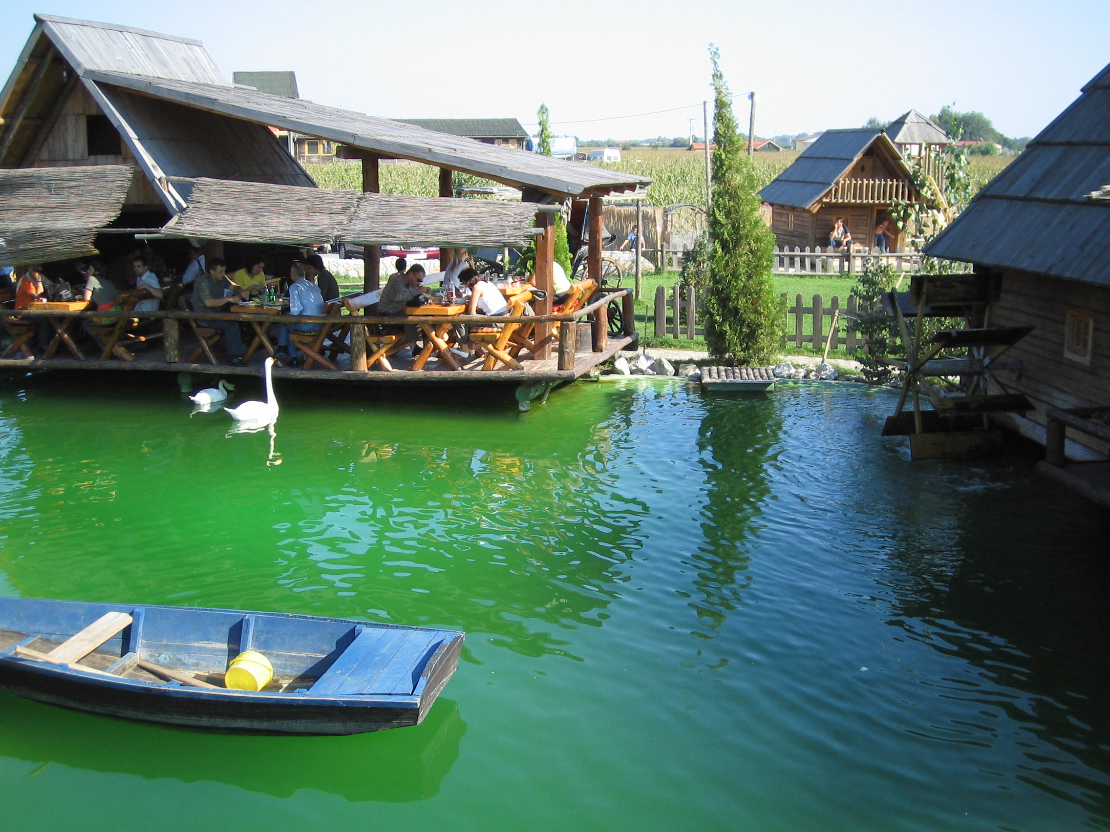 Етно село „Станишићи“, ресторан на води